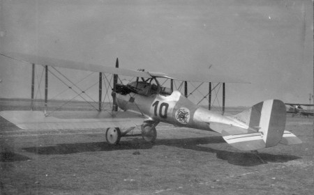 Nieuport-Delage NID29 della 70^ Squadriglia del 23° Gruppo